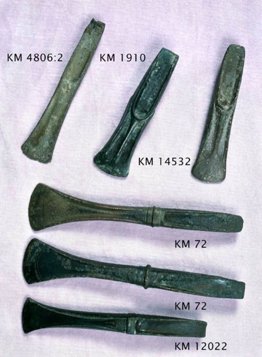 olkakirves; pronssinen olkakirves; Pronssinen olkakirves, joka on löytynyt kaivettaessa soramäkeä Helsingissä Tapanilan Rasissa. Kirves (kanta pyöristetty) on koristeltu viivoin, spiraalein ja kulmaviivoin, ja sitä voidaan pitää pohjoismaisen pronssikauden hienoimpana esineenä Suomessa. Löytöpaikka, röykkiö soramäellä, lienee aiheuttanut esineen pinnan epätasisuuden. Ver. Kirja, s. 53, Holmbergin Finska Fornt., fig. 65; Aspelin, Alkeita, fig. 55, Antiquités, fig. 400; Reinholmin luett. s. 26. Färlingin kat., n. 1910 ja 1911. Löytö on nähtävillä Suomen kansallismuseon esihistorian perusnäyttelyssä.